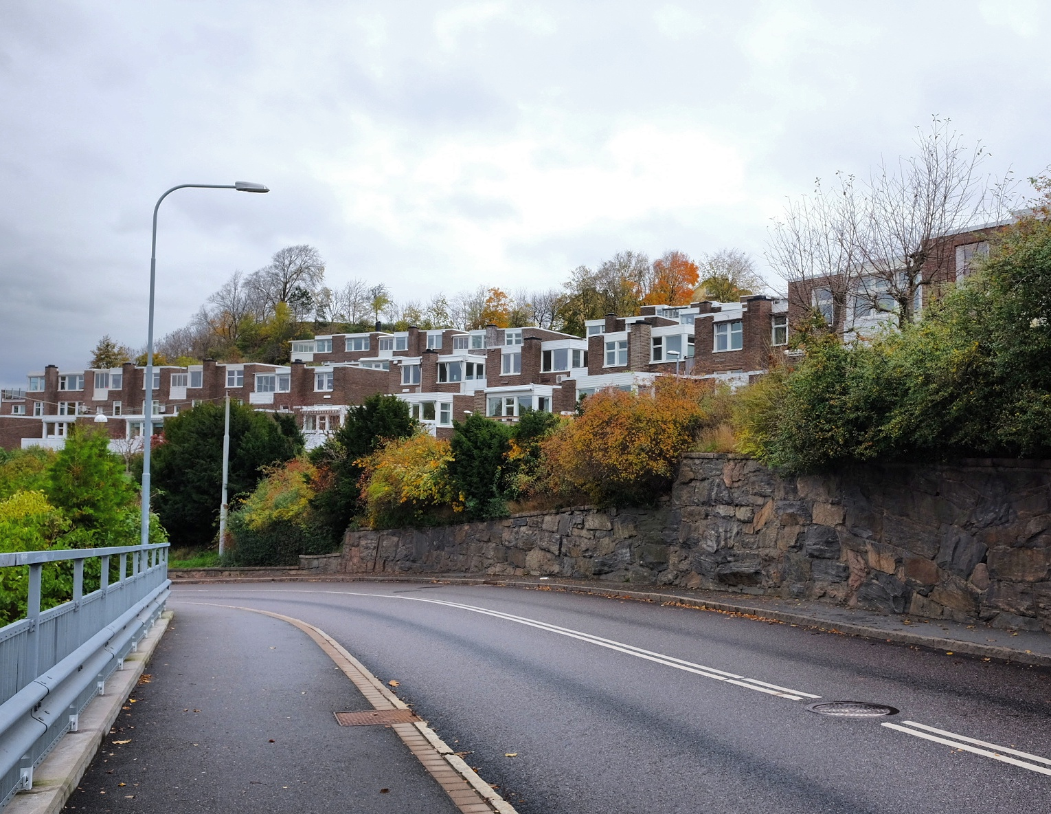 Terrasshus, vid Sankt Paulibacke.